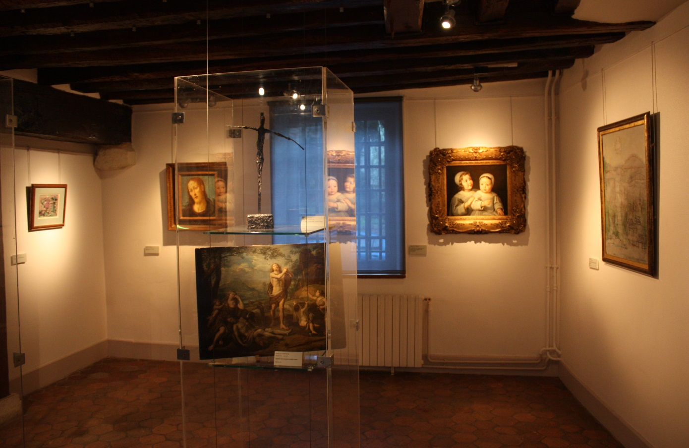 Exposition de la collection personnelle d'oeuvres d'art de Bernard Dorival, hiver 2016.